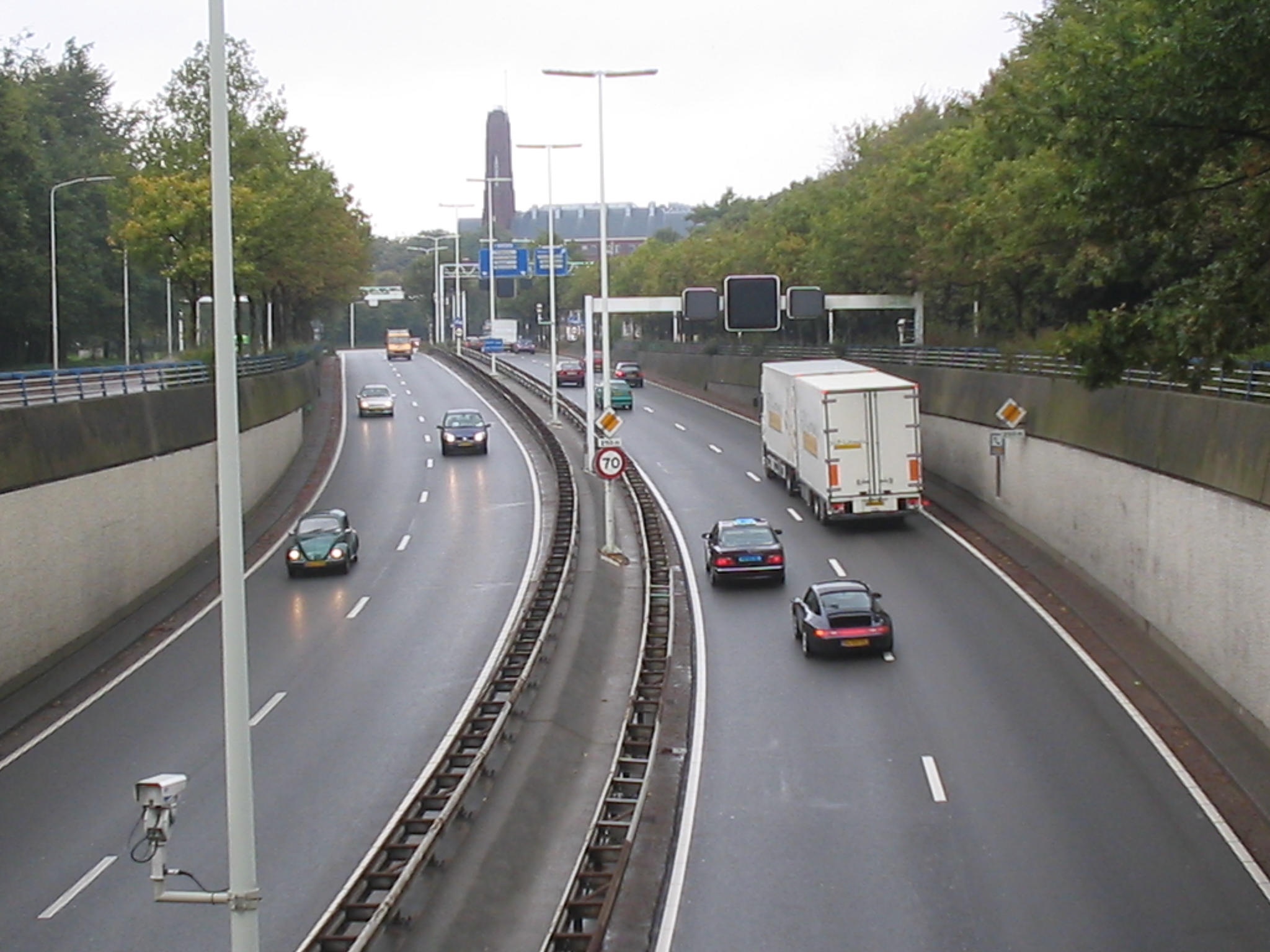 Utrechtse Baan, Den Haag, Netherlands, 21 oktober 2005